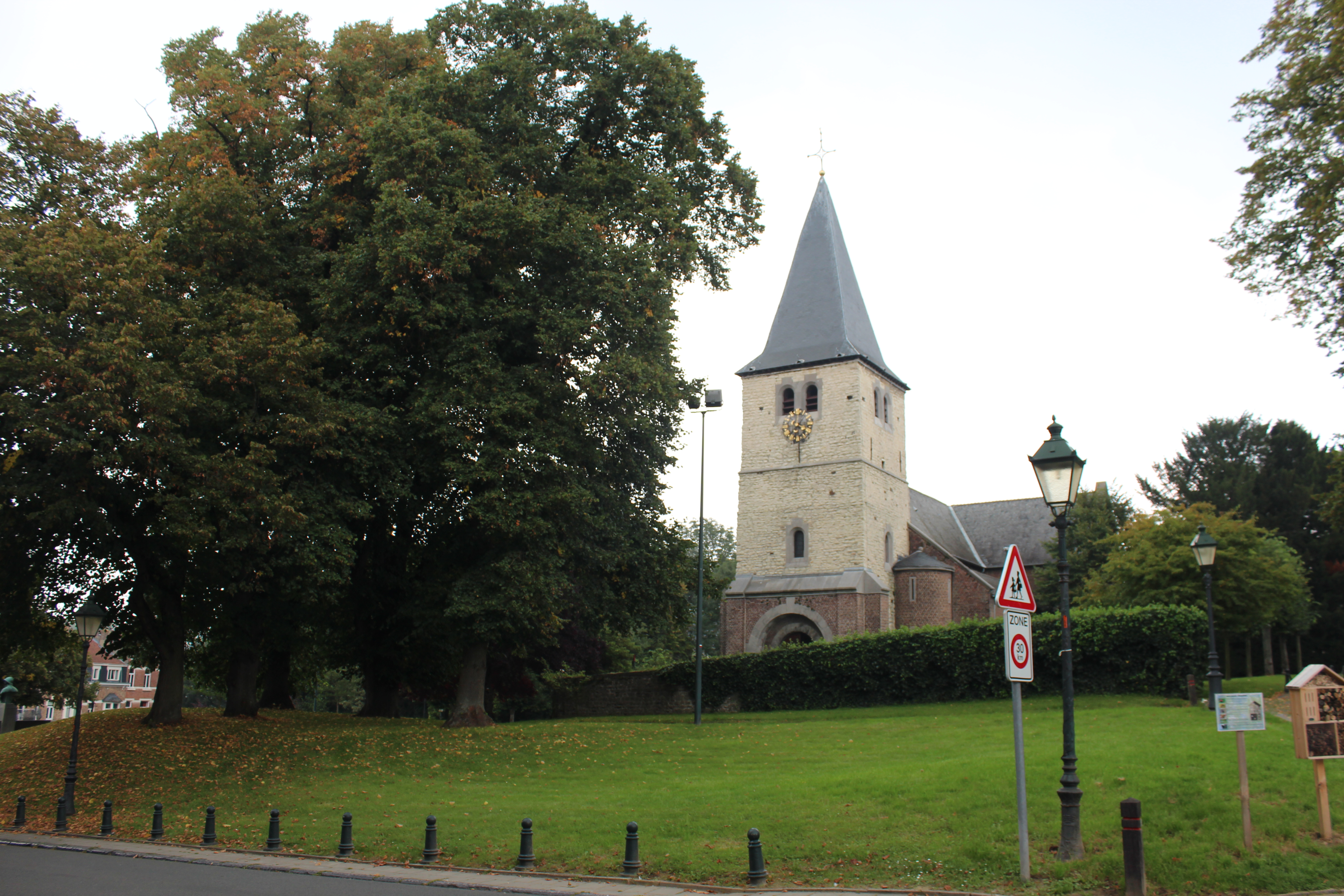 Abords de l'église Saint-Clément (Typologie: Abords verdurisés d'une église) à Watermael Boitsfort. Classé comme Site. Décision définitive de protection : 29/02/1984. Référence: 2328-0006/0.